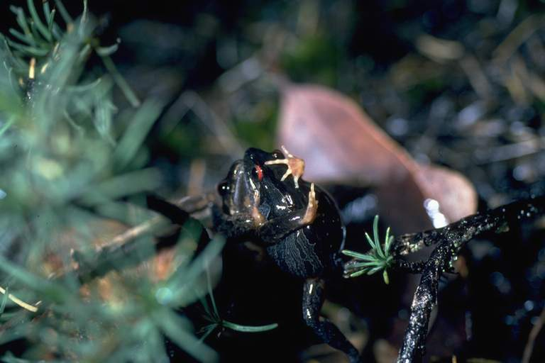 Crinia georgiana